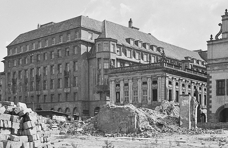 Original image description from the Deutsche FotothekLeipziger Markt mit gestapeltem Trümmermaterial